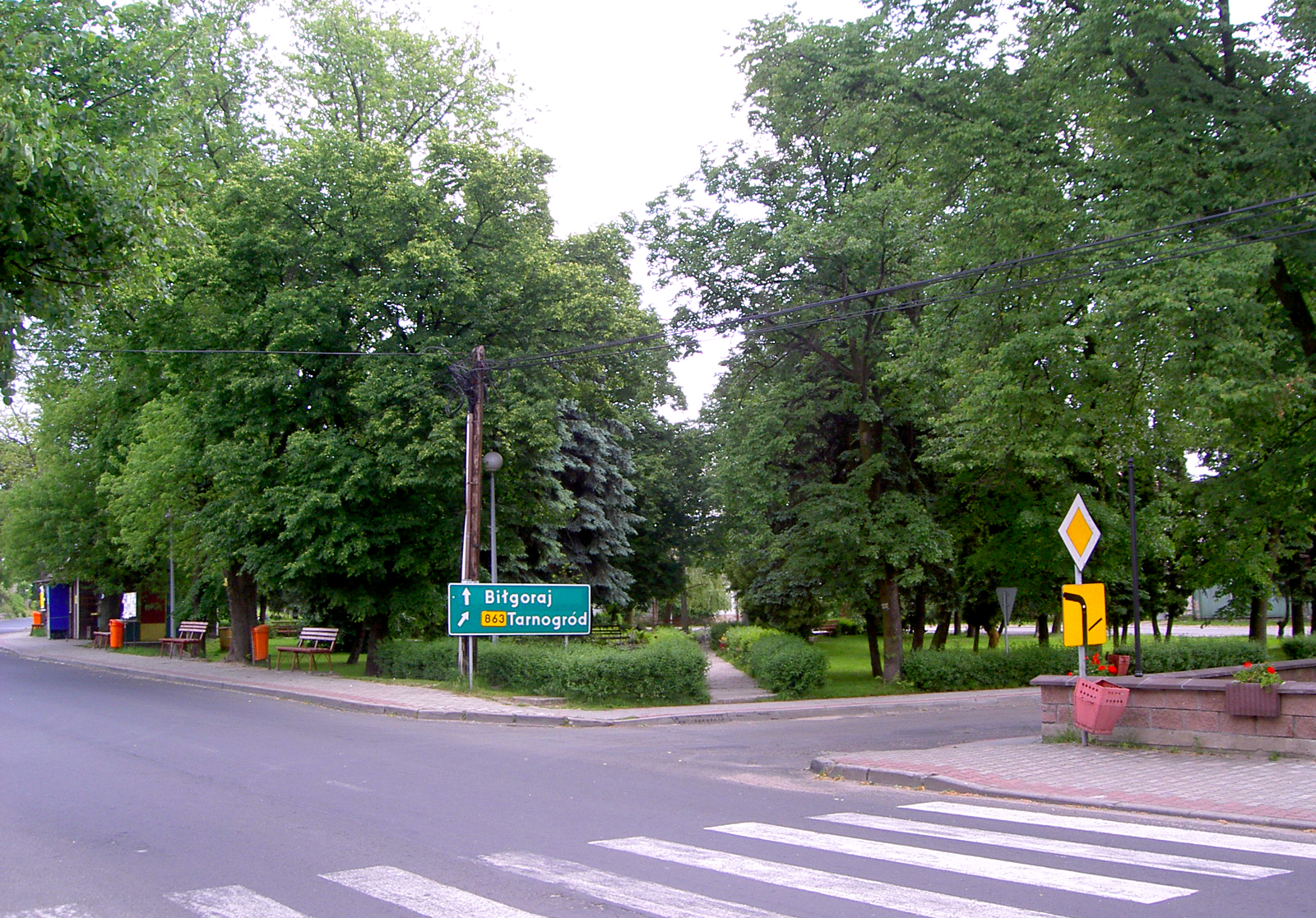 Krzeszów, Poland (podkarpackie) • Park